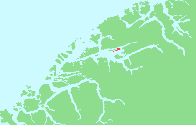 Locator map of Bolsøya, Møre og Romsdal, Norway